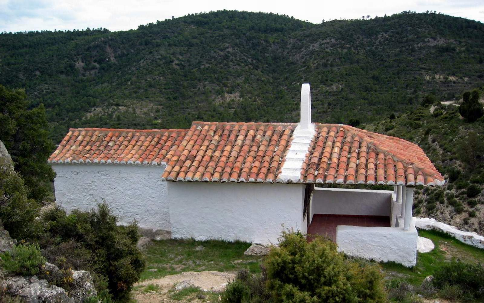 Vista lateral (septentrional) de la Ermita de Santa Quiteria en Hoya de la Carrasca, Arcos de las Salinas (Teruel), año 2006.